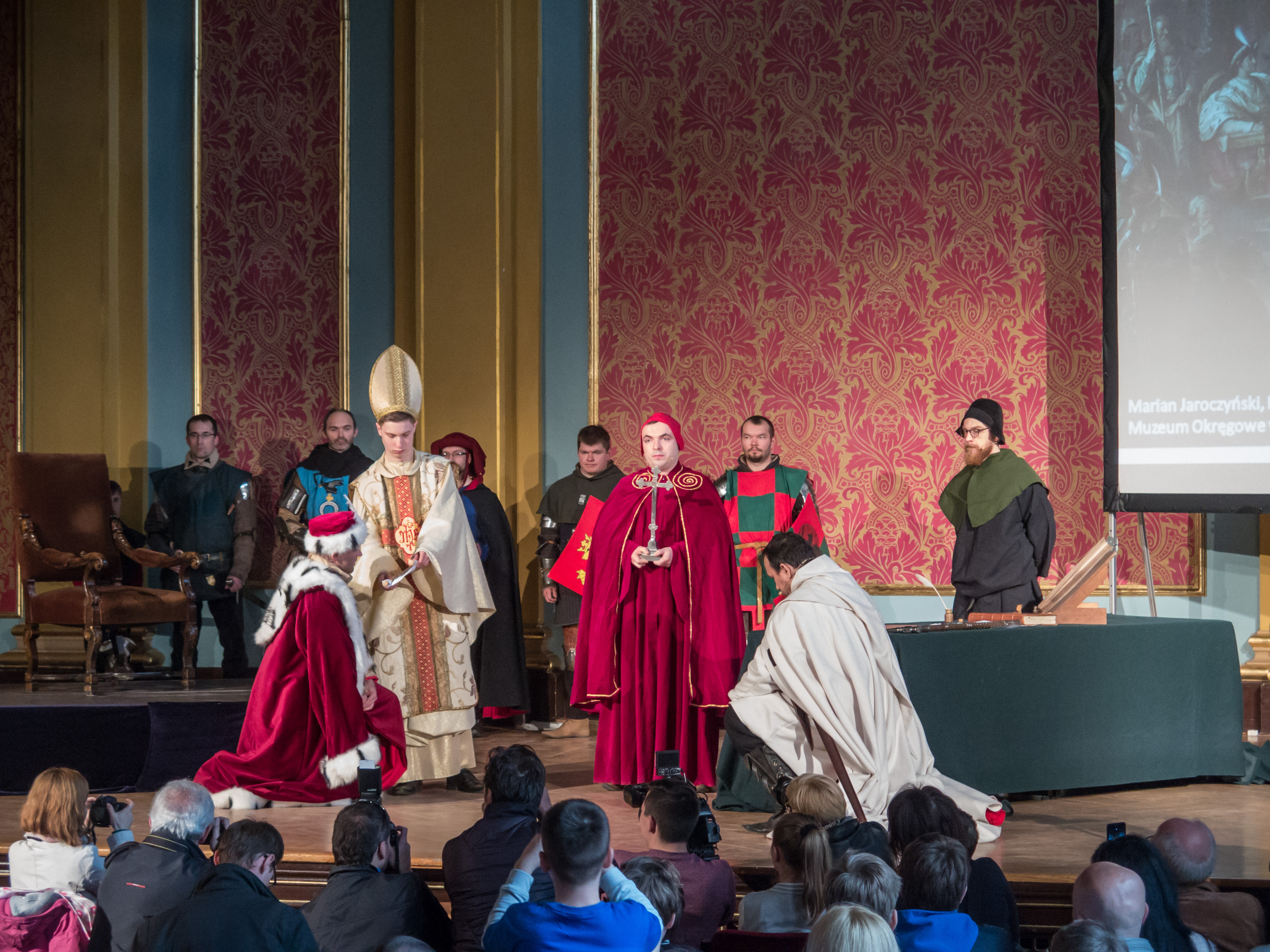 Inscenizacja podpisania drugiego pokoju toruńskiego (1466) w ramach XVI Toruńskiego Festiwalu Nauki i Sztuki.